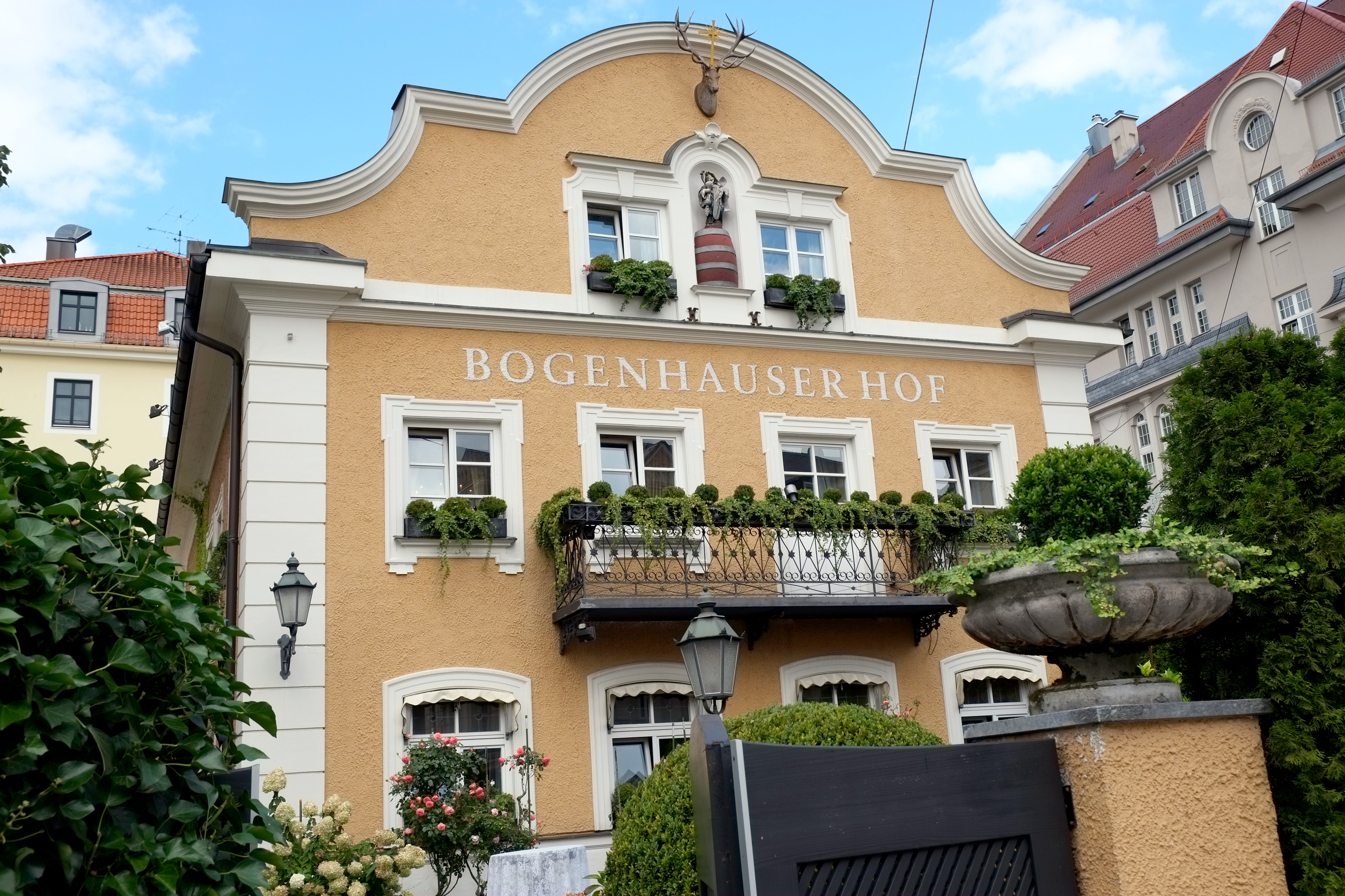 Bogenhauser Hof in München-Bohenhausen, Ismaninger Str. 85